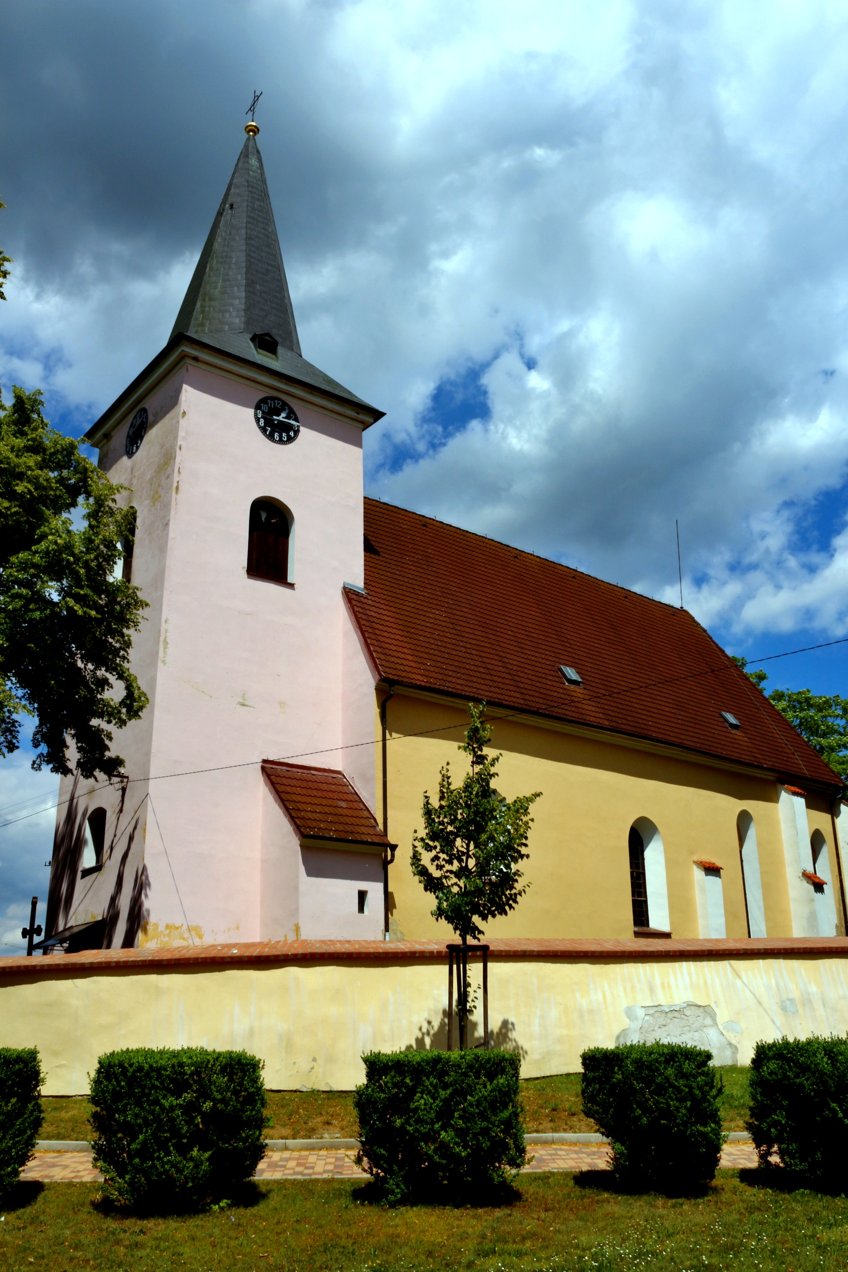 Keblov, náves